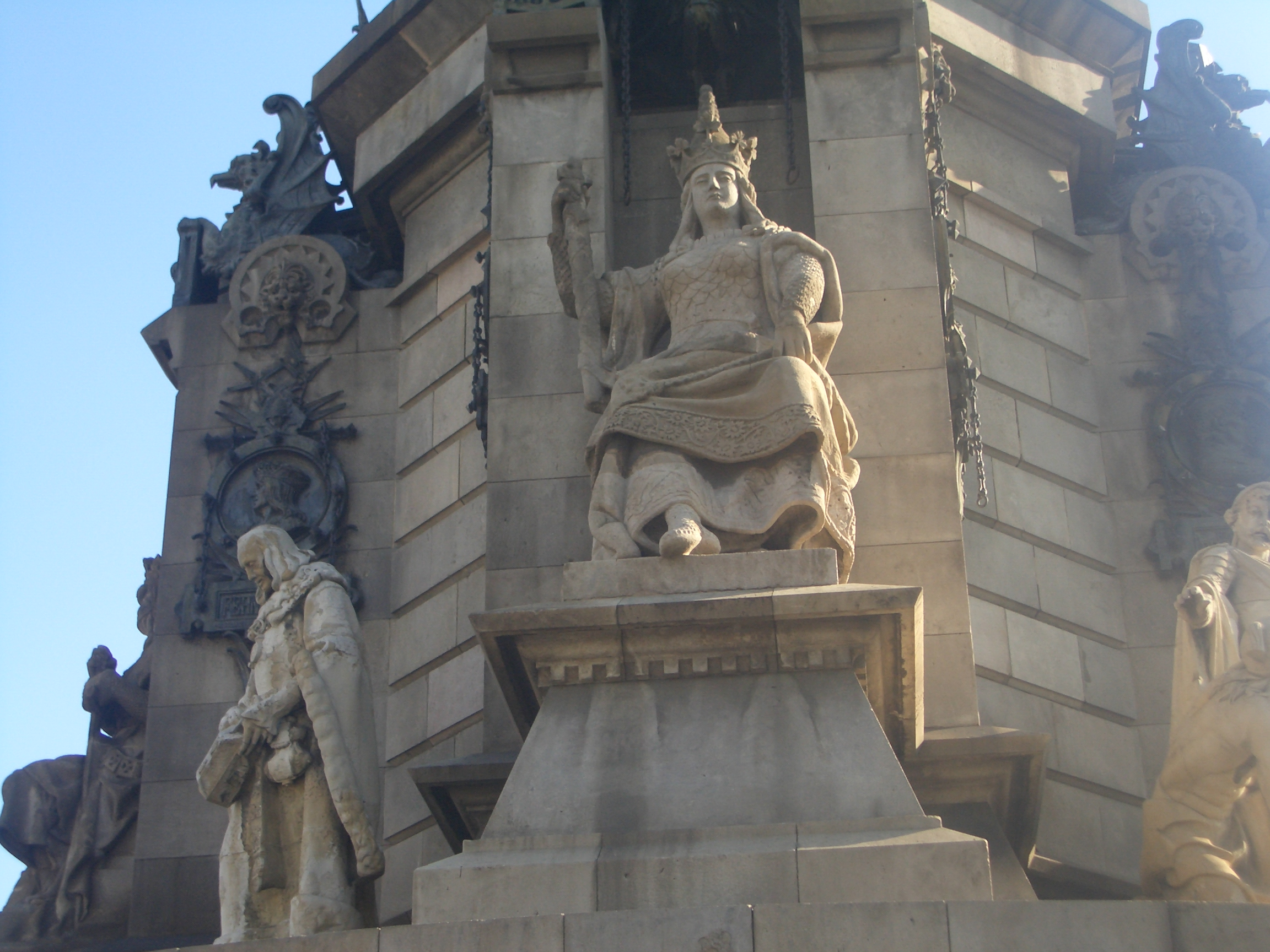 Detalle del Monumento a Colón, Barcelona,España.